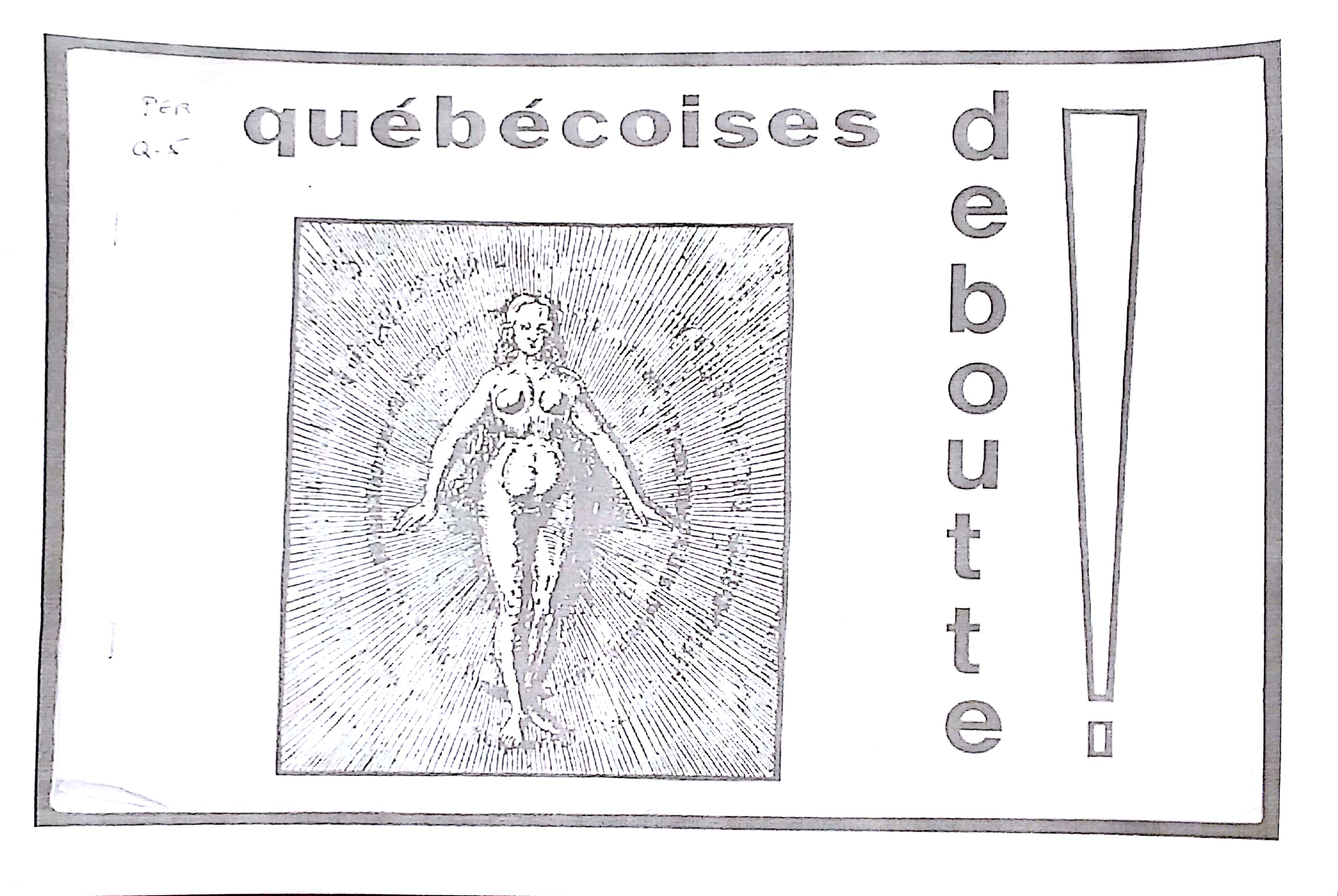 Couverture du premier numéro du journal Québécoises Deboutte publié en novembre 1971 par le FLF